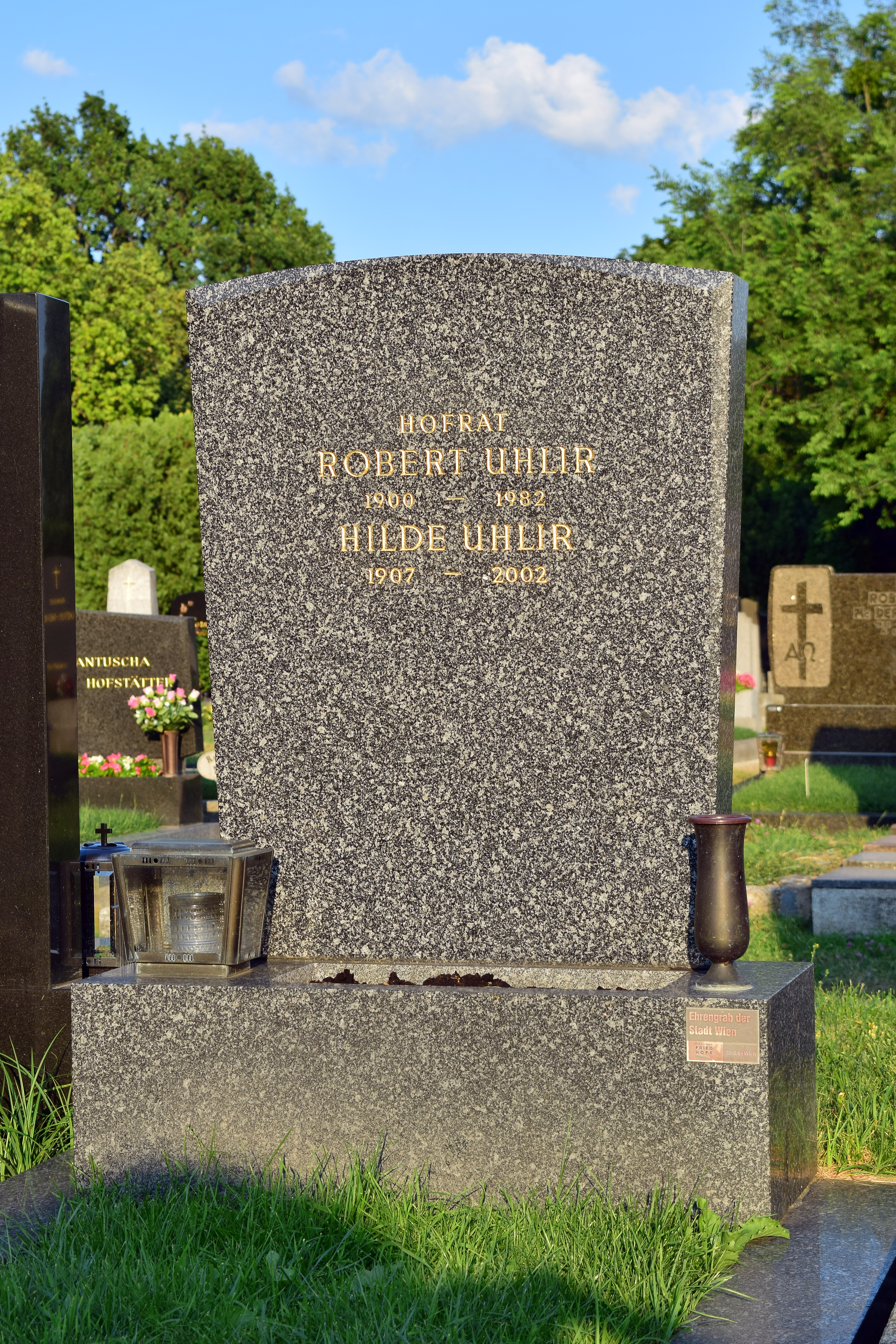 Ehrenhalber gewidmetes Grab von Robert Uhlir auf dem Wiener Zentralfriedhof.